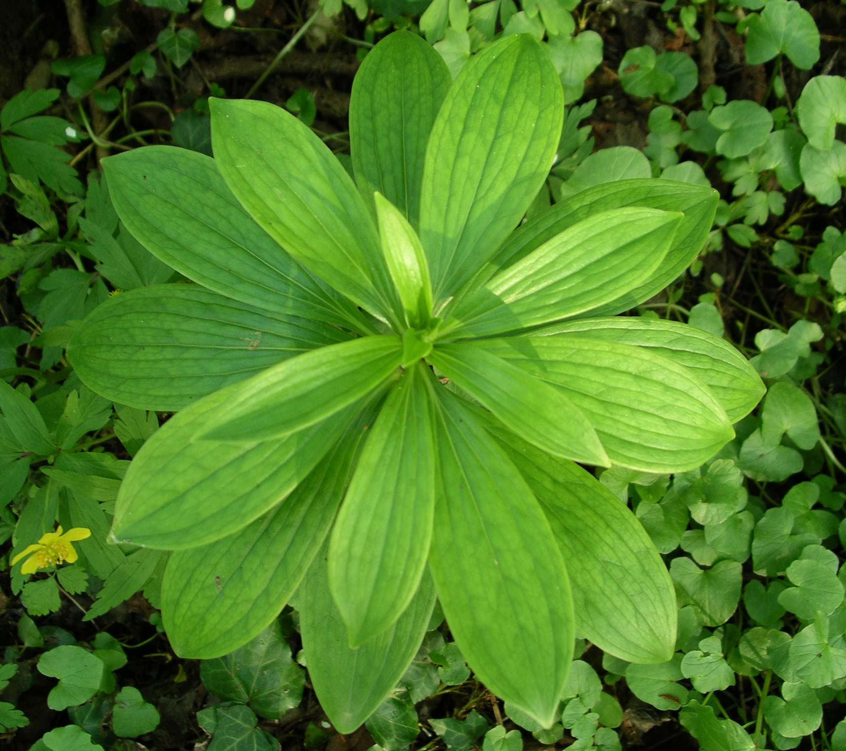 Türkenbundlilie (Lathraea squamaria): BlattrosetteFotografiert in Wels, Oberösterreich (AT)